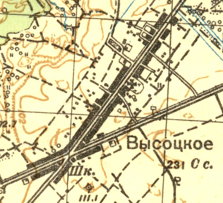 Топографическая карта Ленинградской области, квадрат О-35-12-Г (Ропша), деревня Русско-Высоцкое